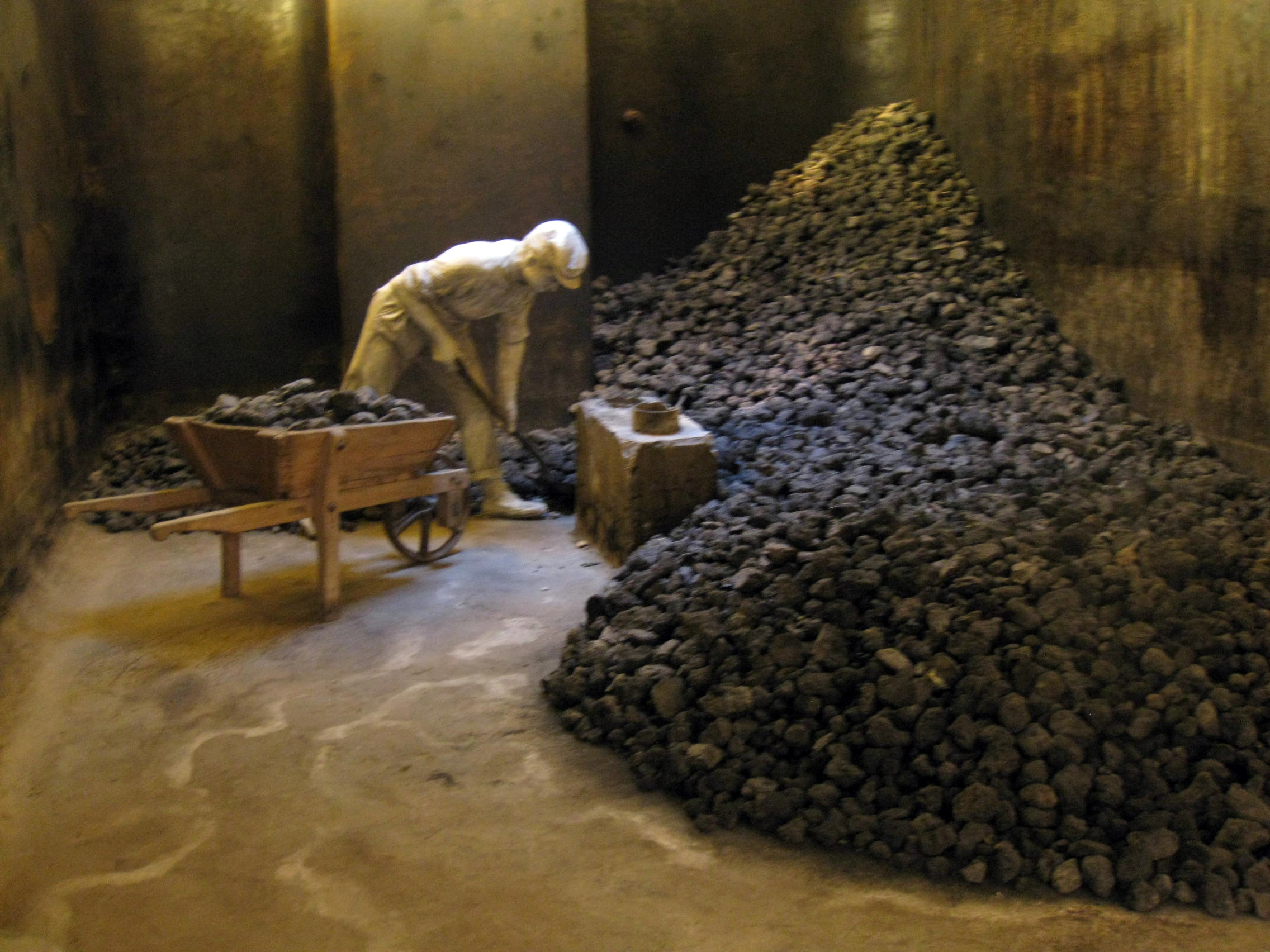 Fàbrica Aymerich, Amat i Jover (Terrassa) Object location41° 33′ 54.49″ N, 2° 00′ 28.14″ E